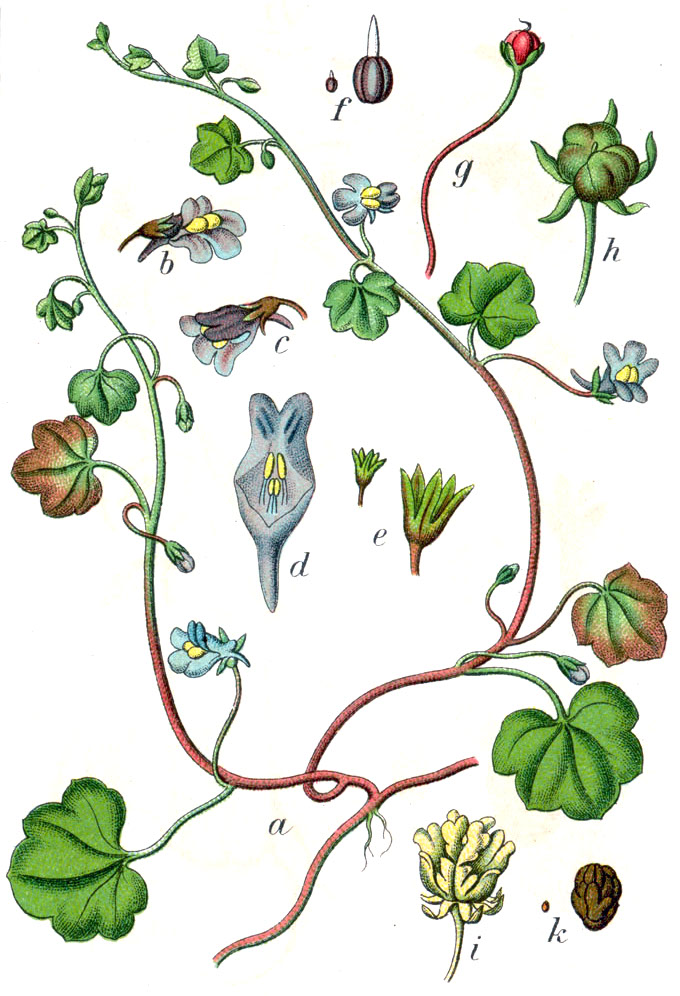 Cymbalaria muralis subsp. muralis, syn. Antirrhinum cymbalaria L. Original Caption Zimbelkraut, Antirrhinum cymbalaria